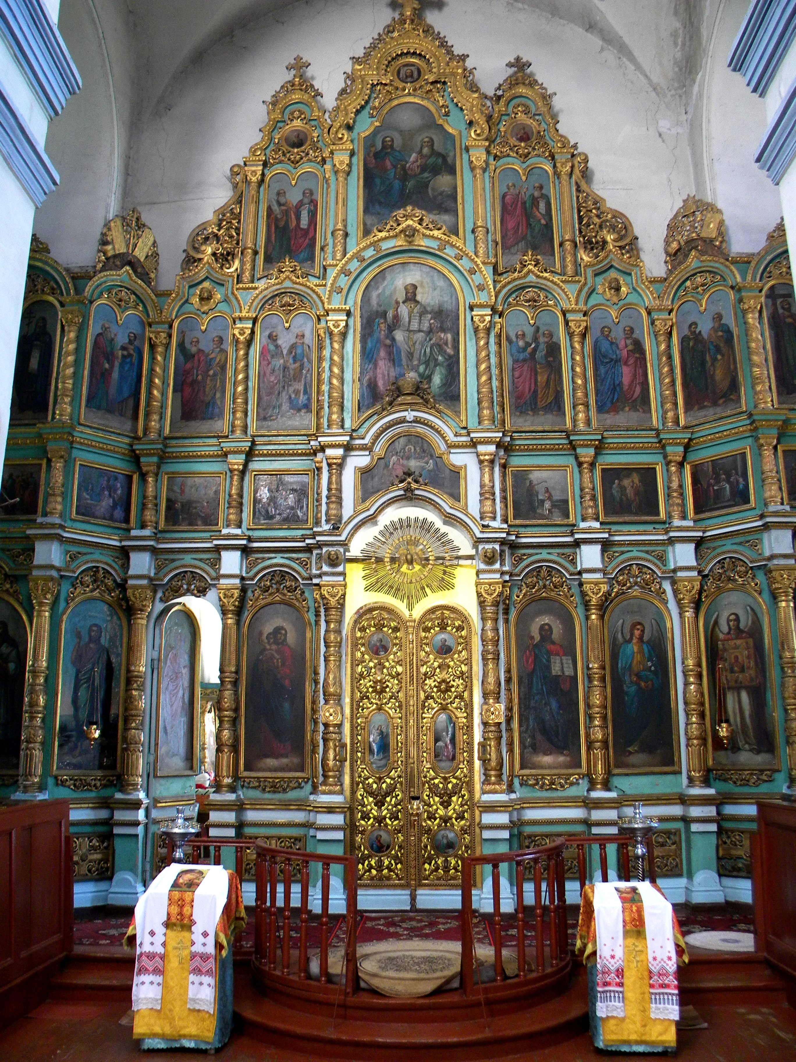 Иконостас Знаменского храма в селе Борки Суджанского района Курской области